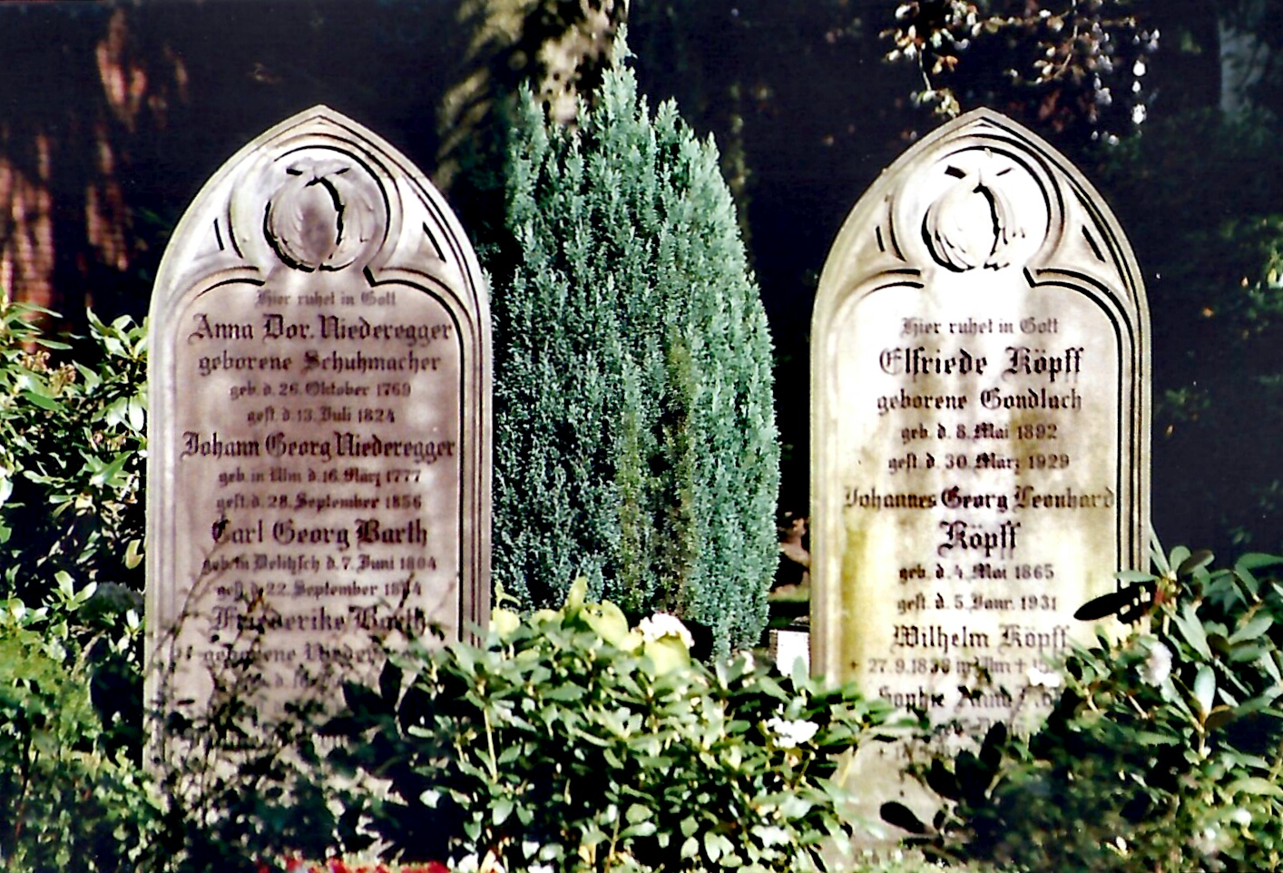 Grabsteine auf dem Friedhof der St